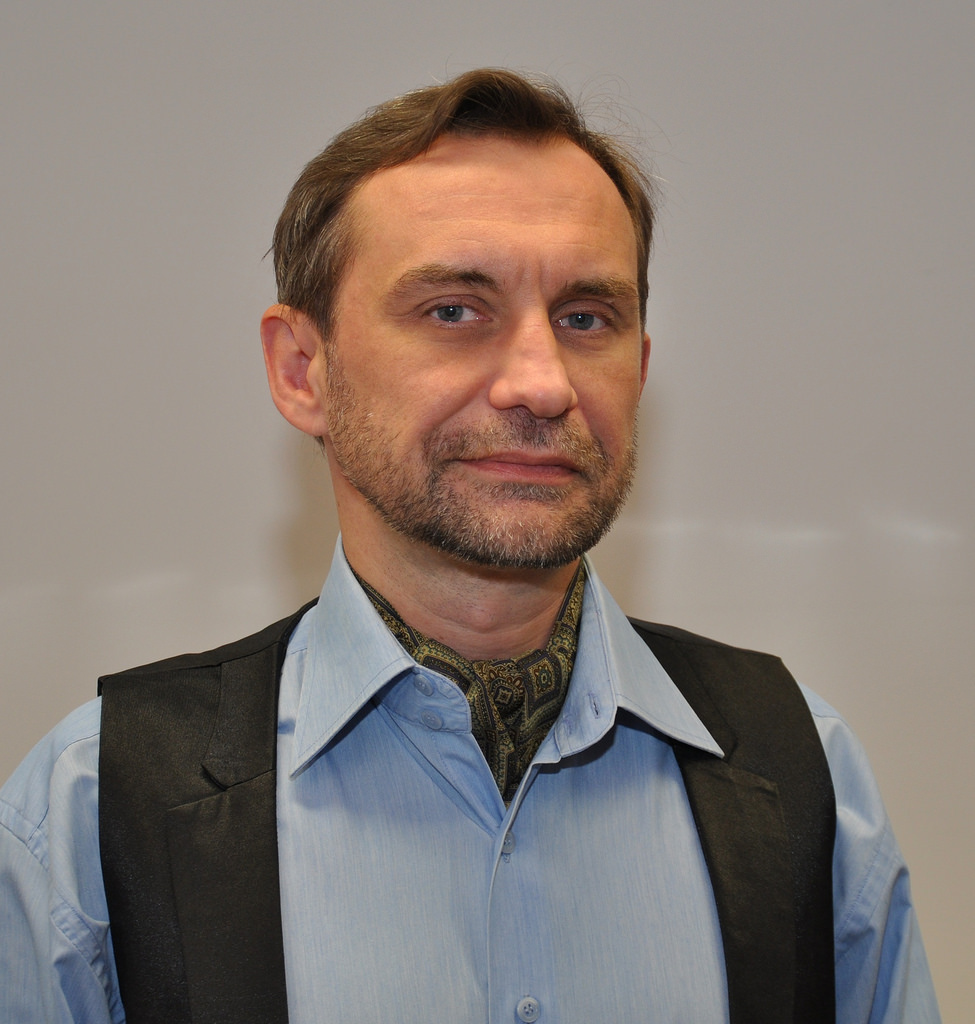 Tomáš Tožička